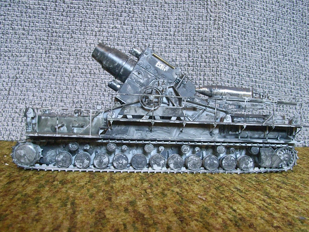 Mörser Karl (Modell)